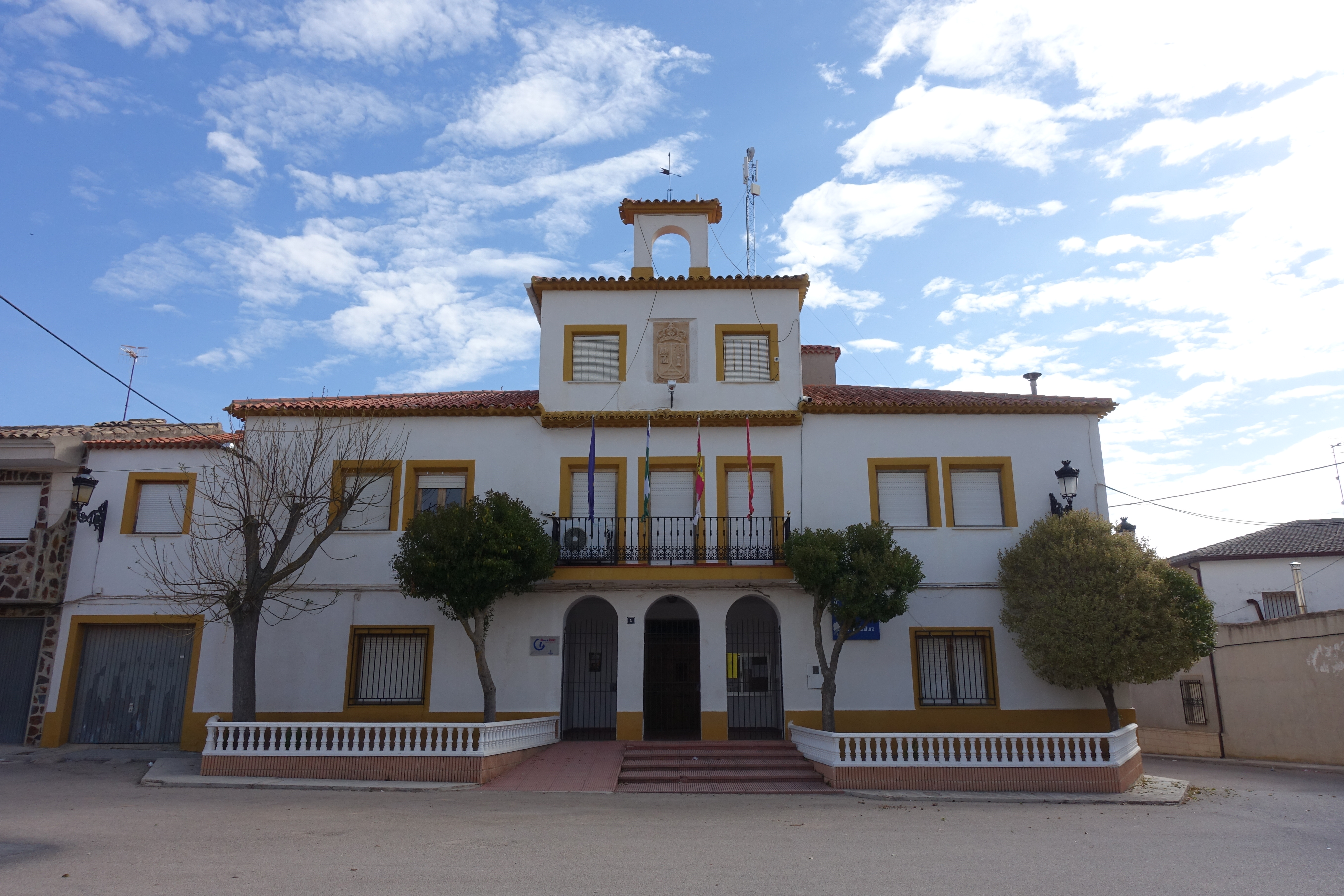 Casa consistorial de Santa María del Campo Rus (Cuenca, España).